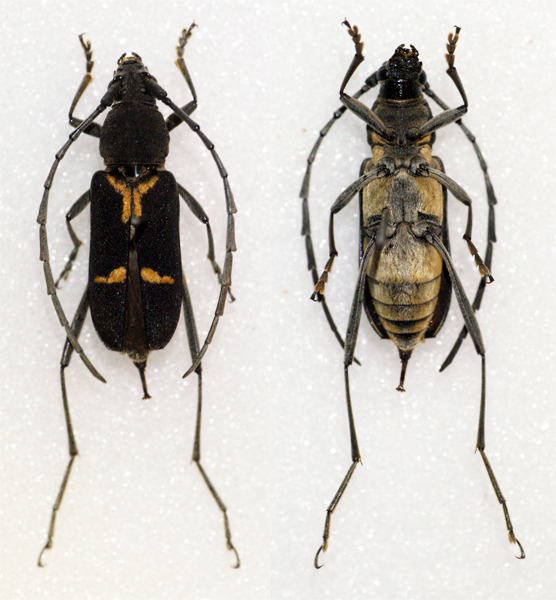 Pascoe,1857 Sex: Male Data: 20-07-12 - Gongcheng - Prov Guangxi - China Size: ?